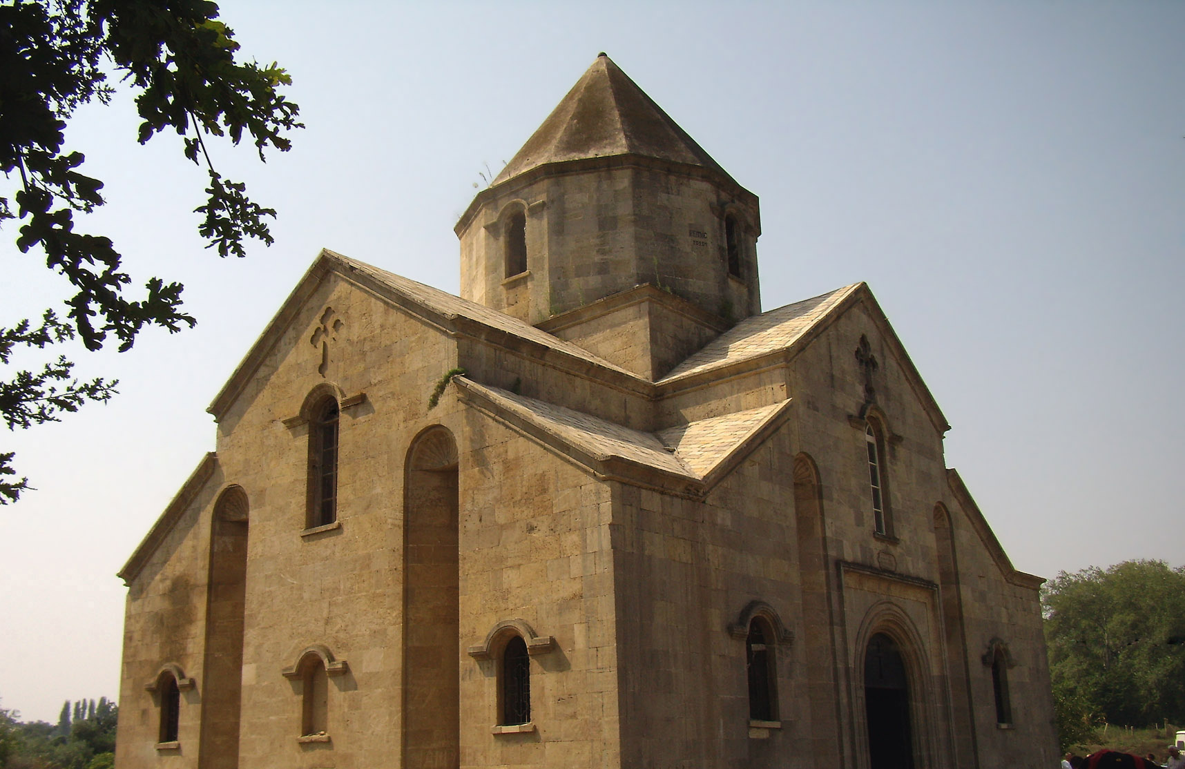 4-րդ դարի հայկական եկեղեցի Դաղստանի Նյուղդի գյուղում